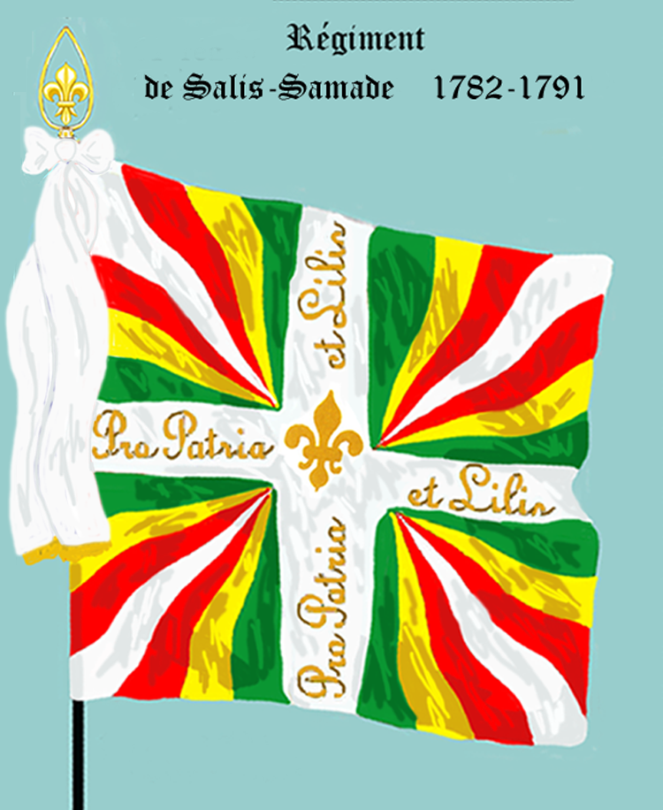 Ordonnanzfahne eines Fremdenregiments im königlich französischen Dienst. (Schweizer Regiment) - Entnommen und überarbeitet aus: „LES UNIFORMES ET LES DRAPEAUX DE L'ARMÉE DU ROI“ Marseille 1899. - Drapeau d'Ordonnance d' un régiment étranger au service française (régiment suisse.)